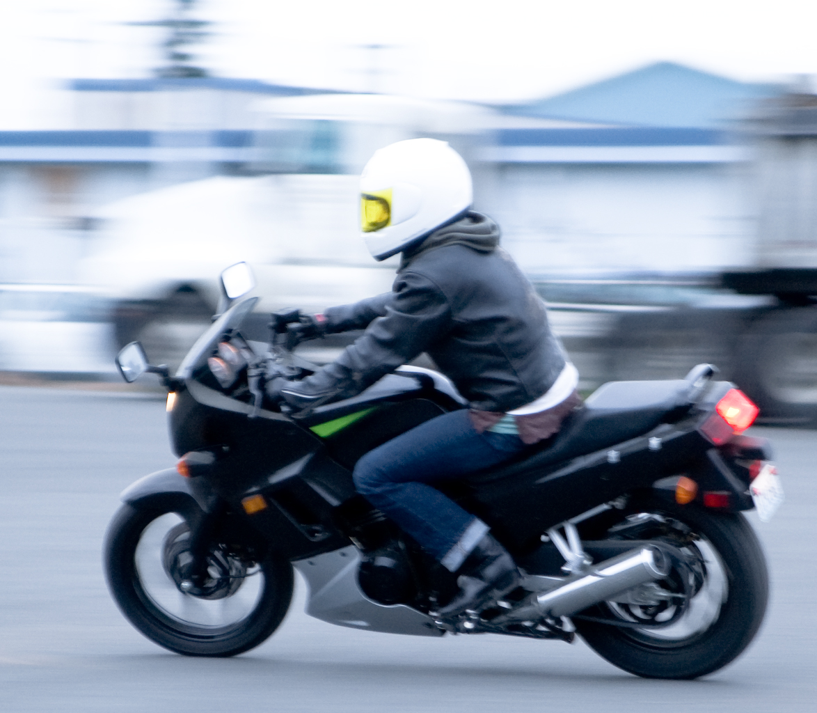 Rider learning on a Kawasaki Ninja 250